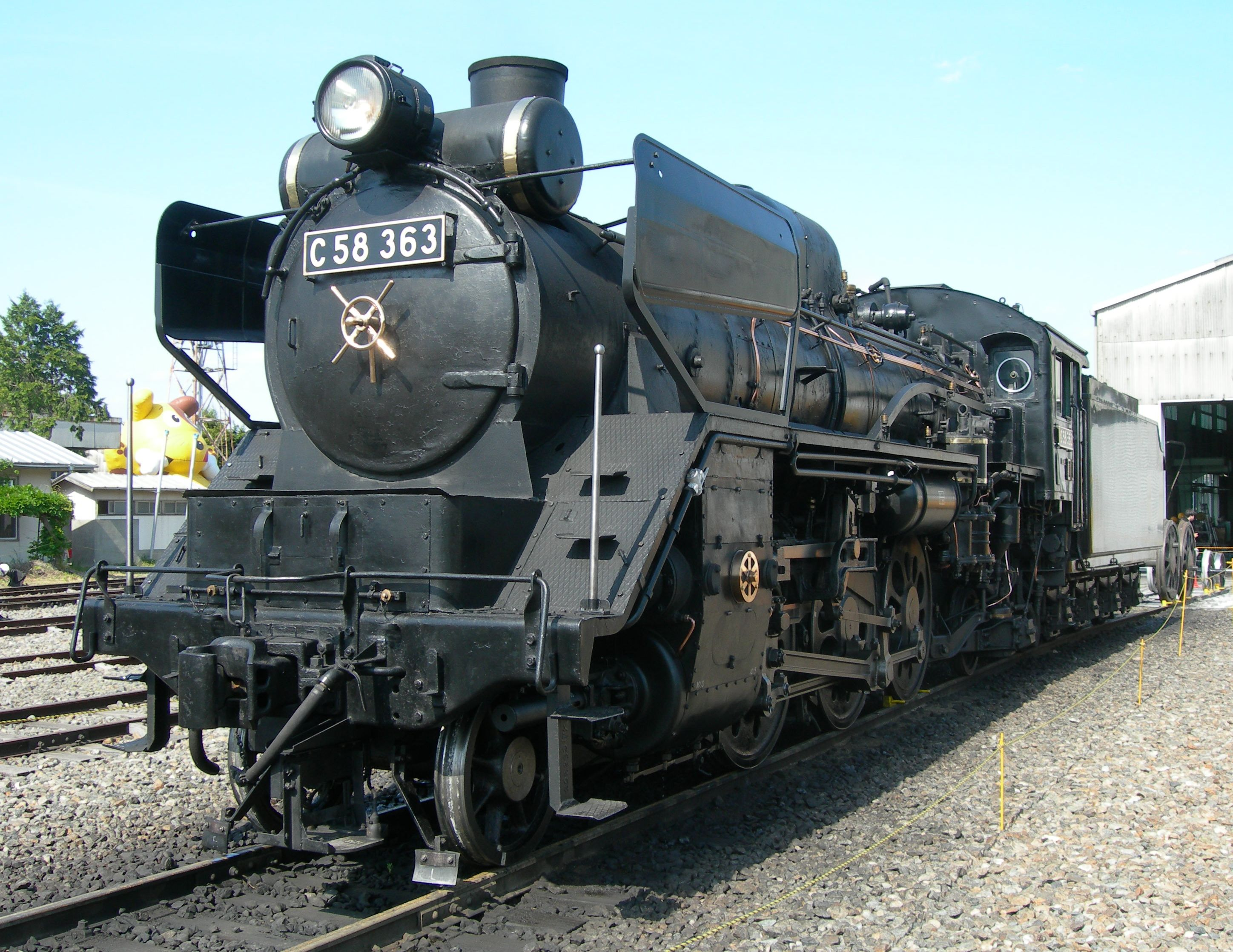 国鉄C58形蒸気機関車/門鉄デフ（CH-1）